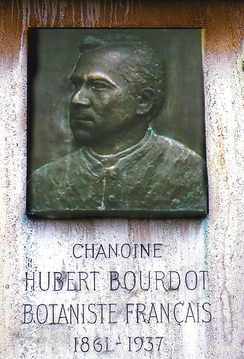 Photo prise à l’occasion du congrès SMF de Montluçon en octobre 1986